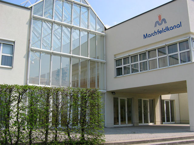 Premisis Betriebsgesellschaft Marchfeldkanal